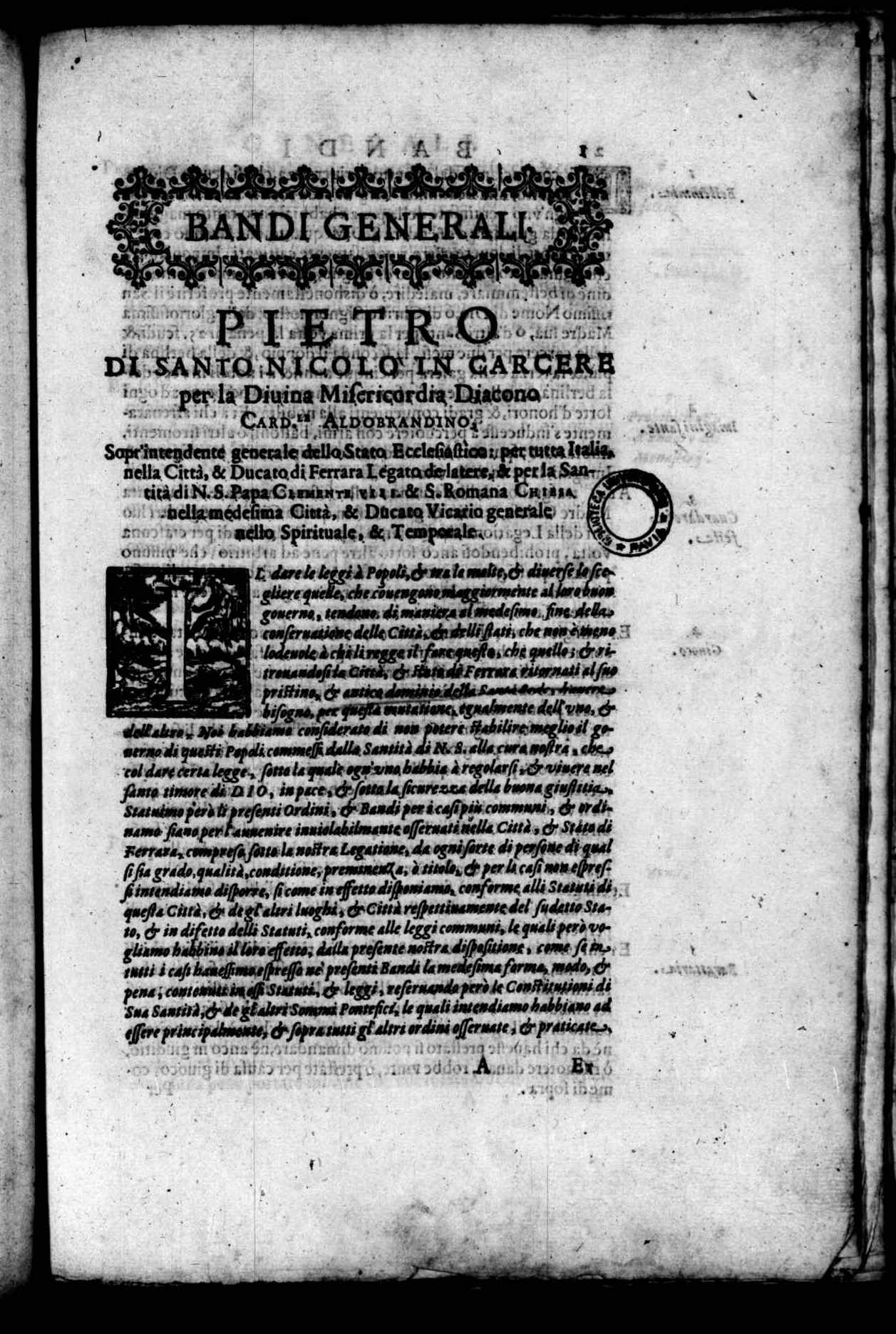 Pagina 1